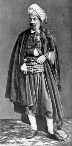 Algerian Jew.